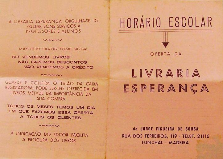 Horário Escolar da Livraria Esperança. Oferta da Livraria Esperança de Jorge Figueira de Sousa (1931-2-7-2012), 1965 (c.) Rua dos Ferreiros, n.º 119, Funchal, ilha da Madeira.